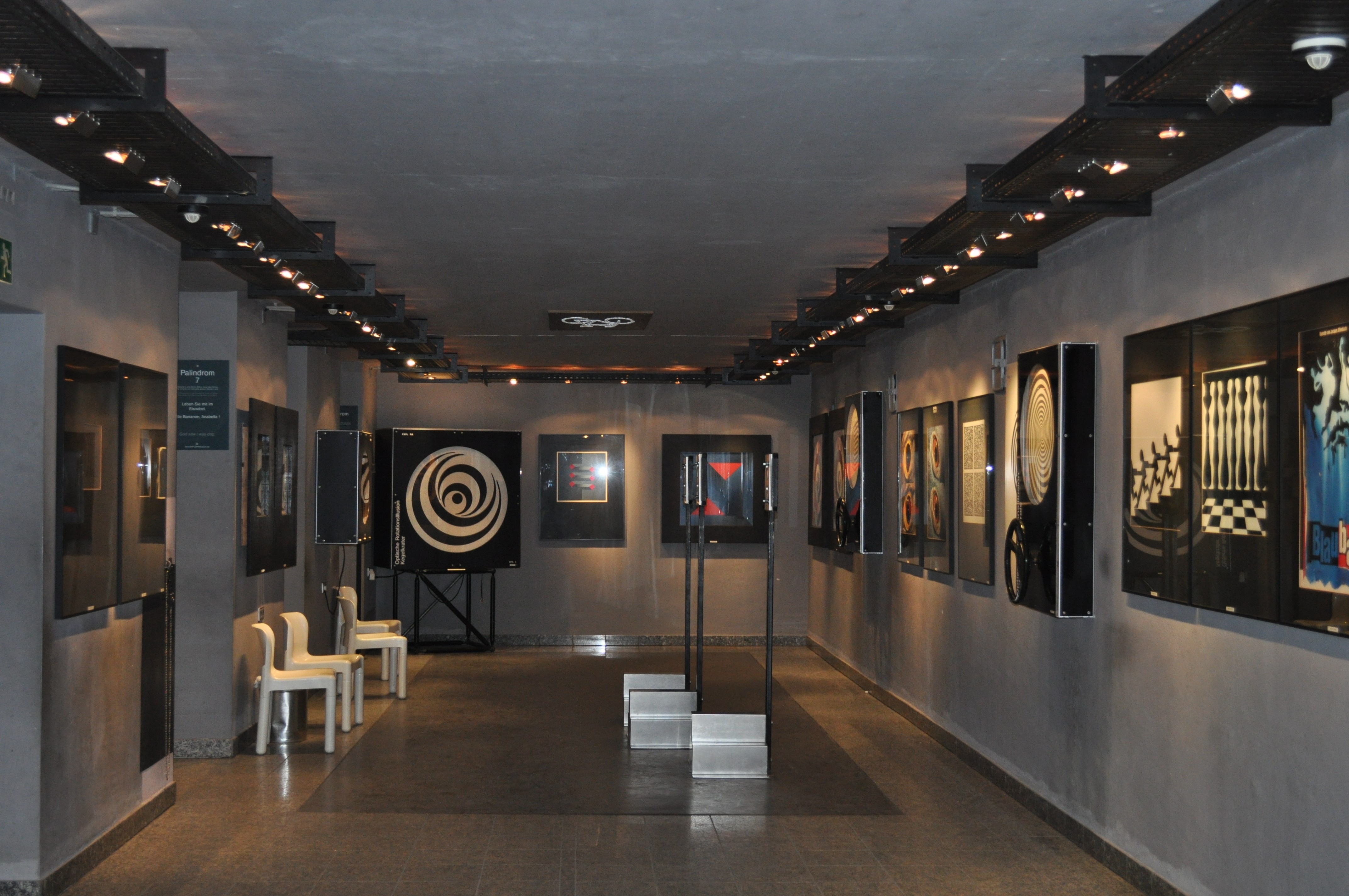 Explora-Museums in Frankfurt am Main. Ausstellungsstücke.